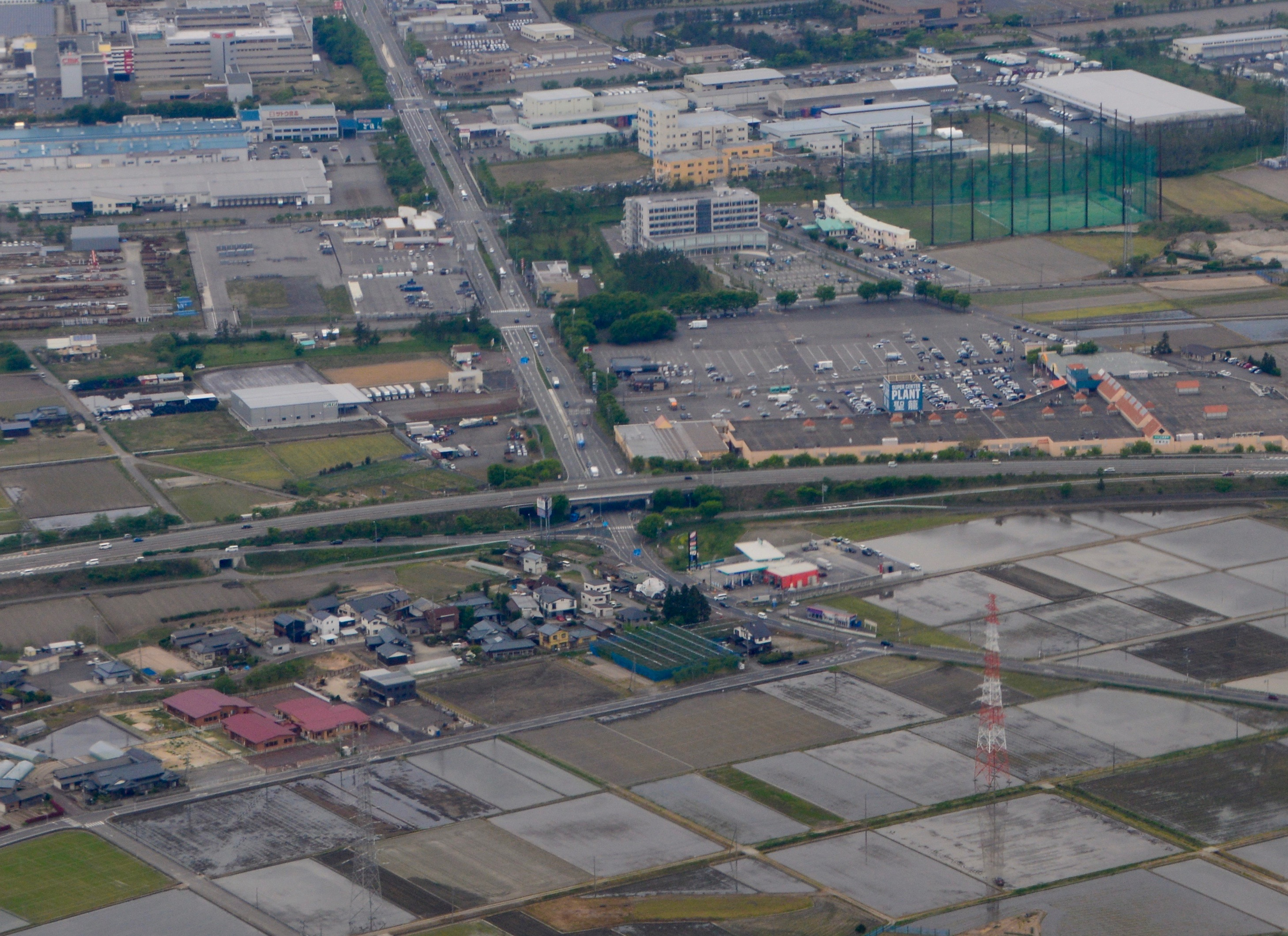 新新バイパス蓮野インターチェンジ